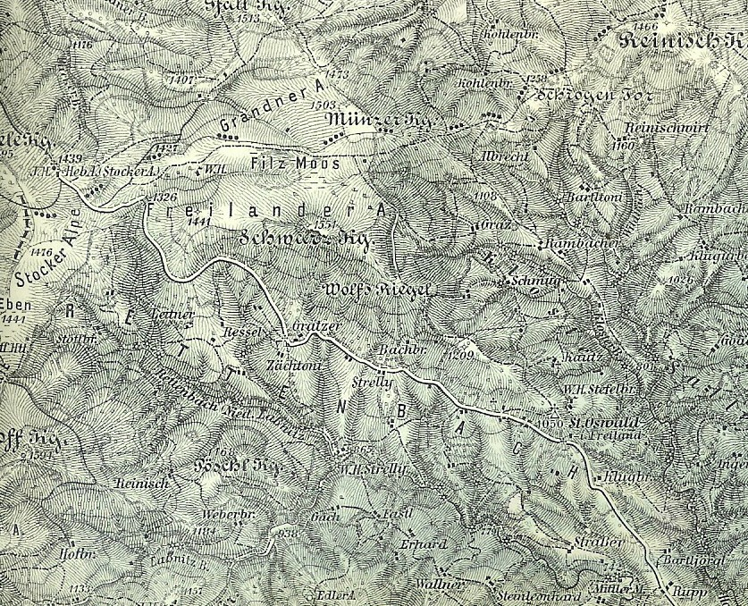 Gemeindegebiet Kloster vor Arbeitsbeginn an der Klosterwinkelstraße in der 1. Republik